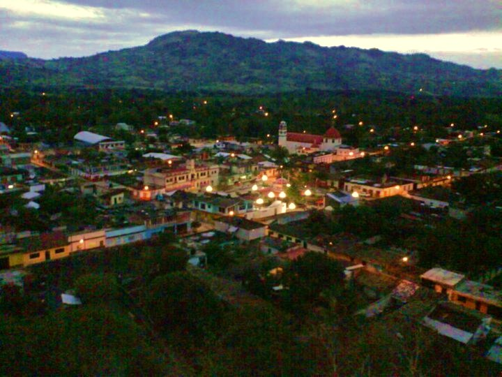 Vista desde el Cerrito.